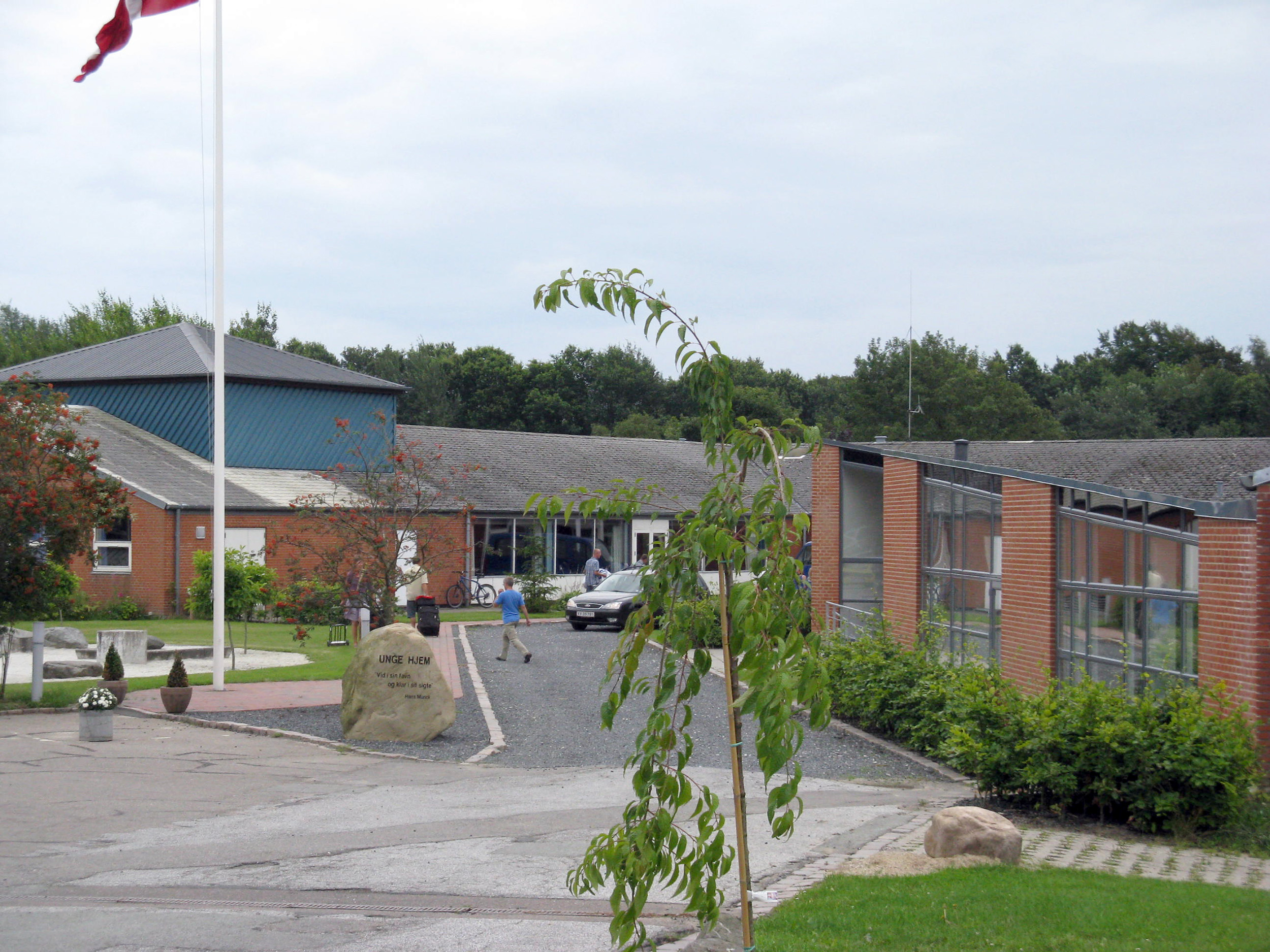 Unge hjems efterskole i Skaade Bakker , Højbjerg, Aarhus